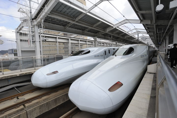 鹿児島中央駅に停車中の新幹線N700系（2013年5月）